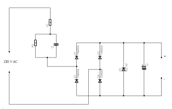 Zasilacz beztransformatorowy This circuit image could be re-created using vector graphics as an SVG file. This has several advantages; see Commons:Media for cleanup for more information. If an SVG form of this image is available, please upload it and afterwards replace this template with vector version available|new image name . It is recommended to name the SVG file "Power supply ckt.svg" – then the template Vector version available (or Vva) does not need the new image name parameter.